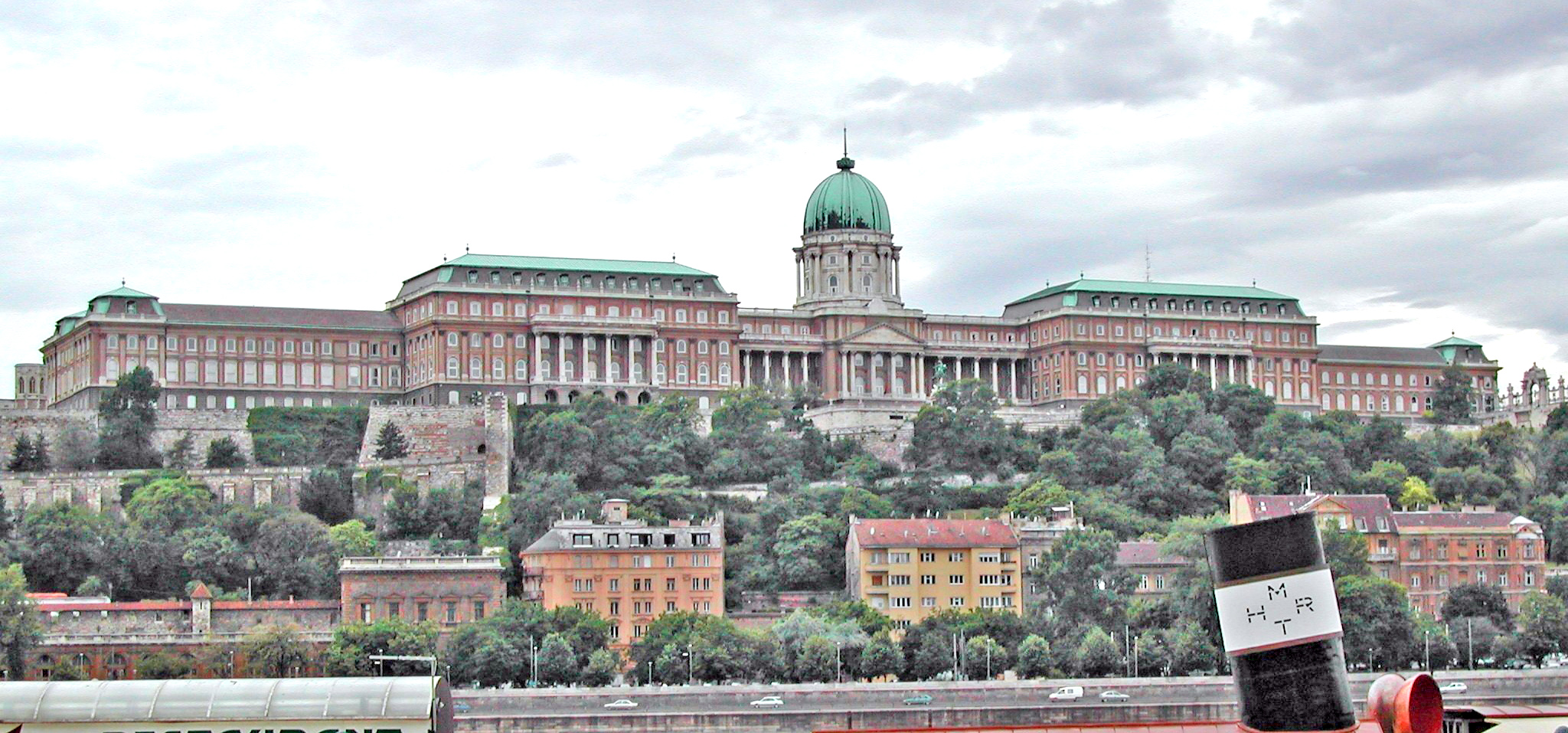 Buergpalast zu Budapest Source:Eege Foto vum User:Alexandra Lizenz:GFDL